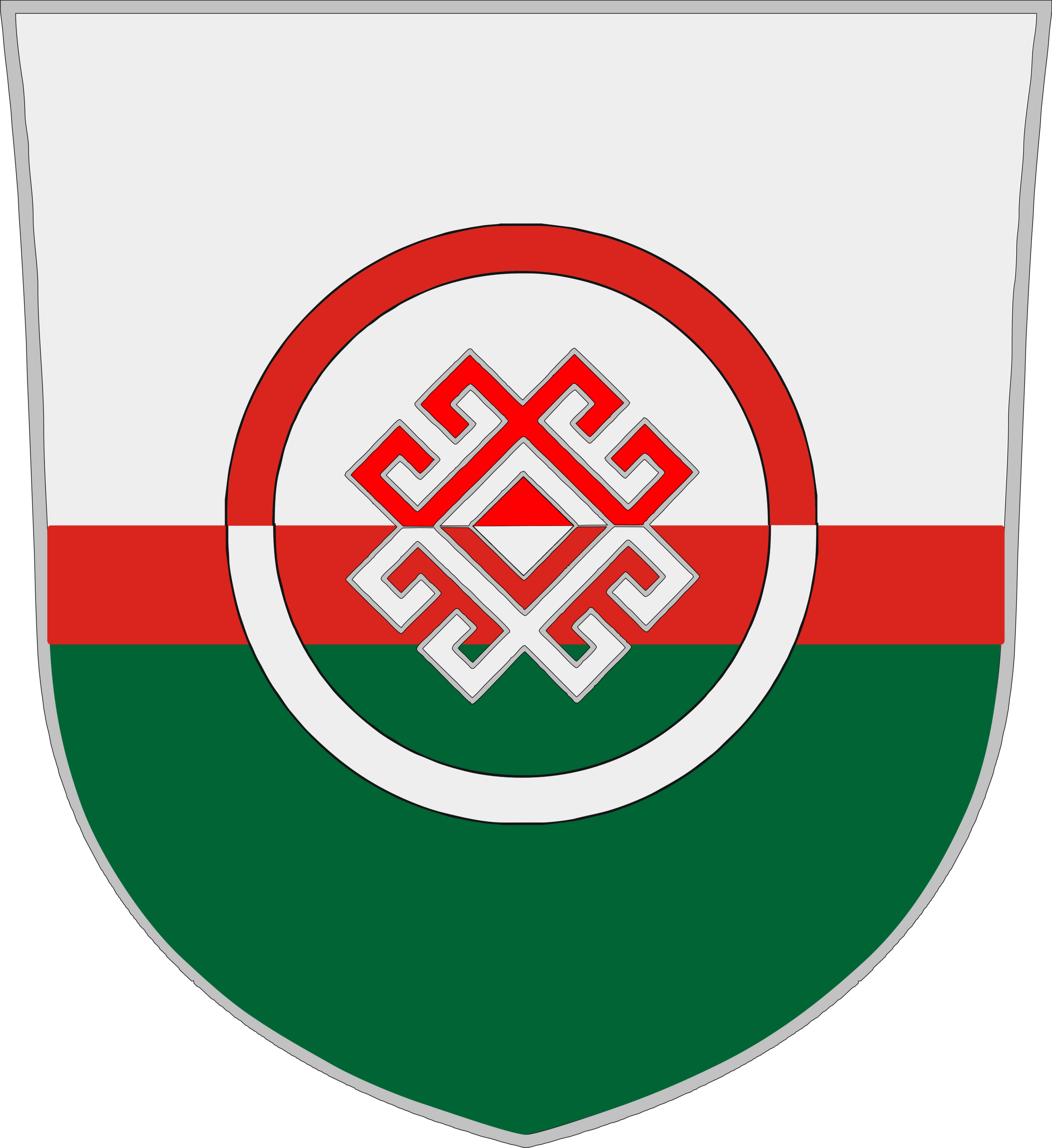 Герб "Марий Ушем"